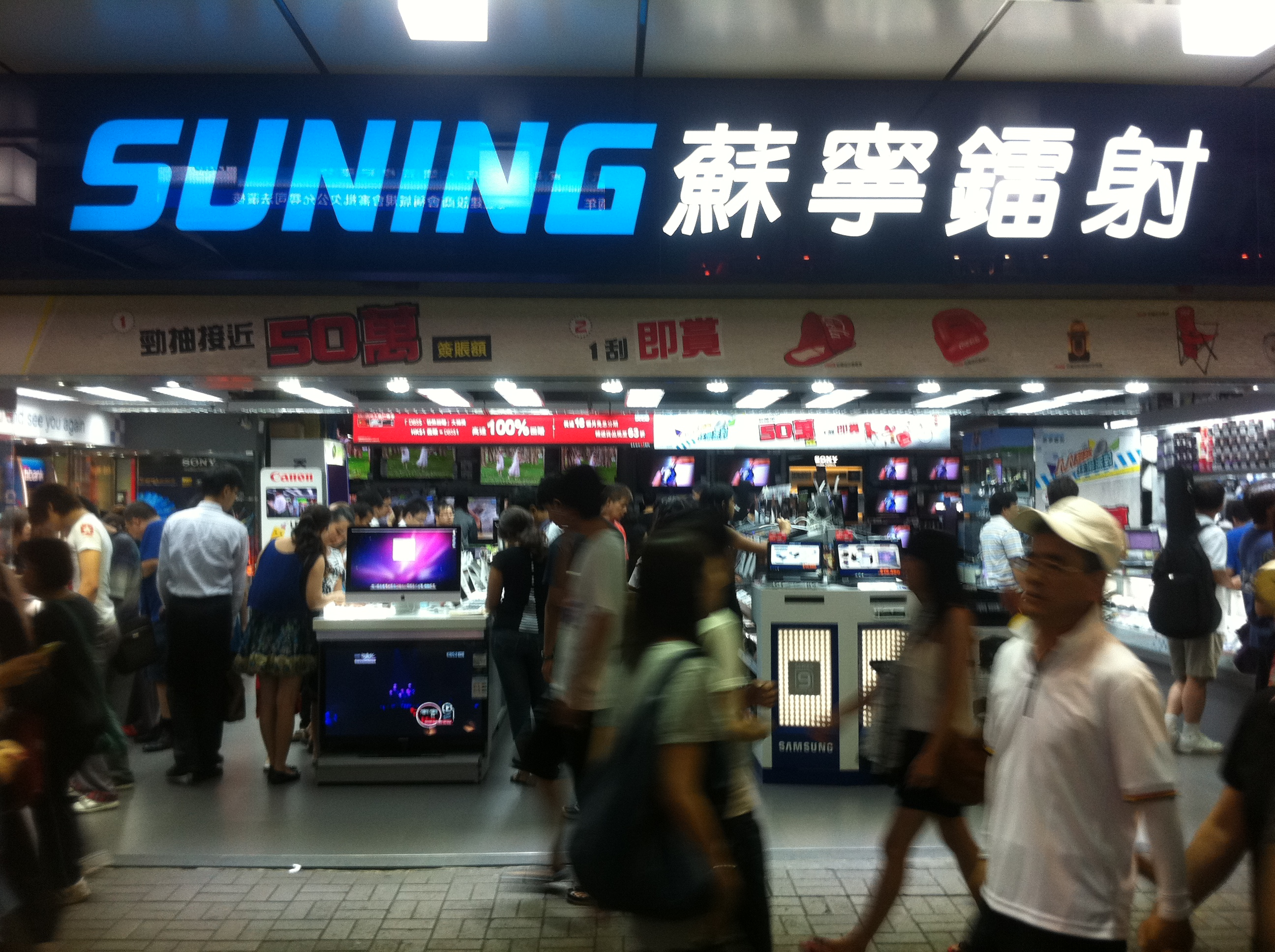 中文（香港）: 旺角西洋菜南街商店蘇寧鐳射